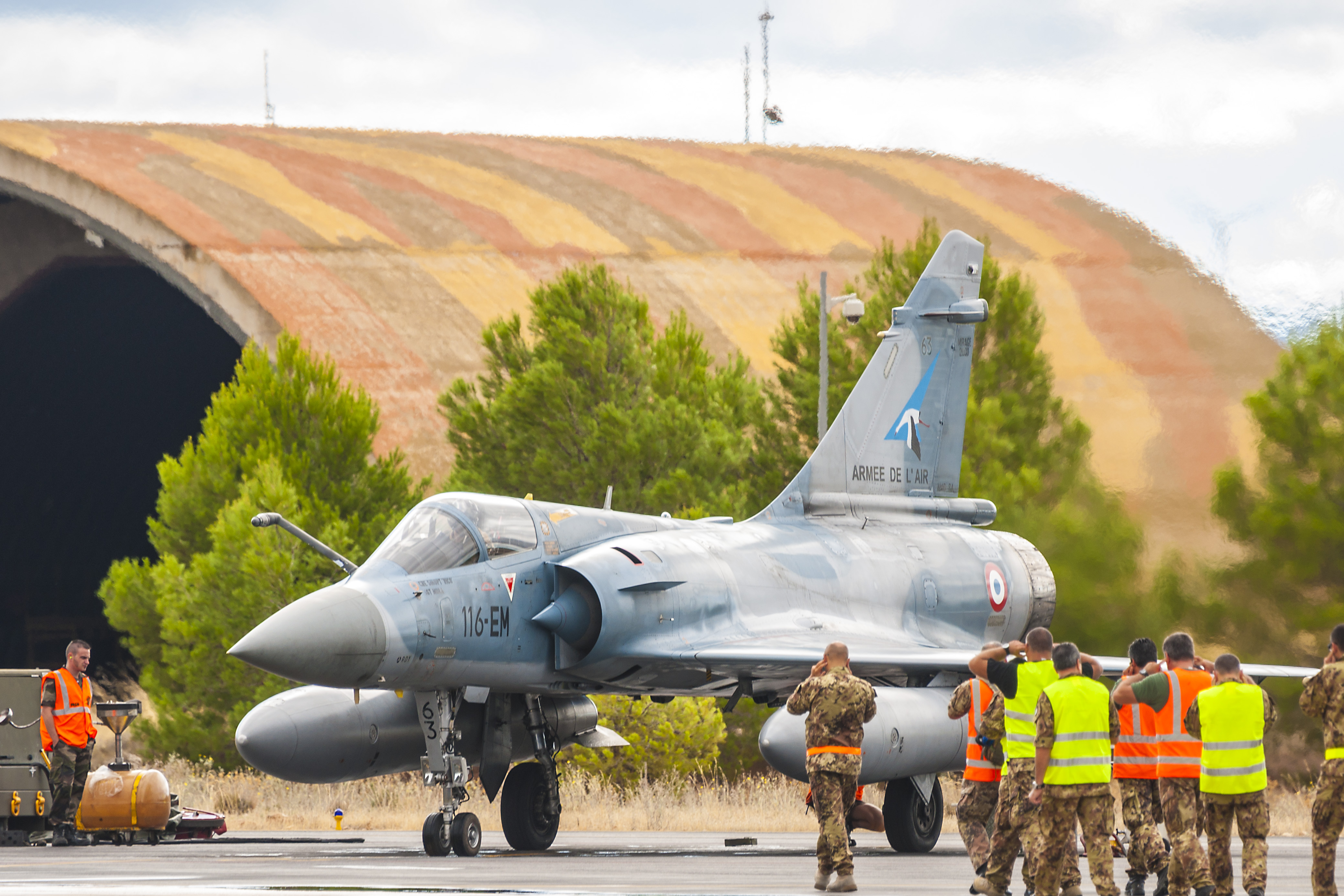 Fotos tomadas durante la primera jornada del TPL2013-5 SpottingDay